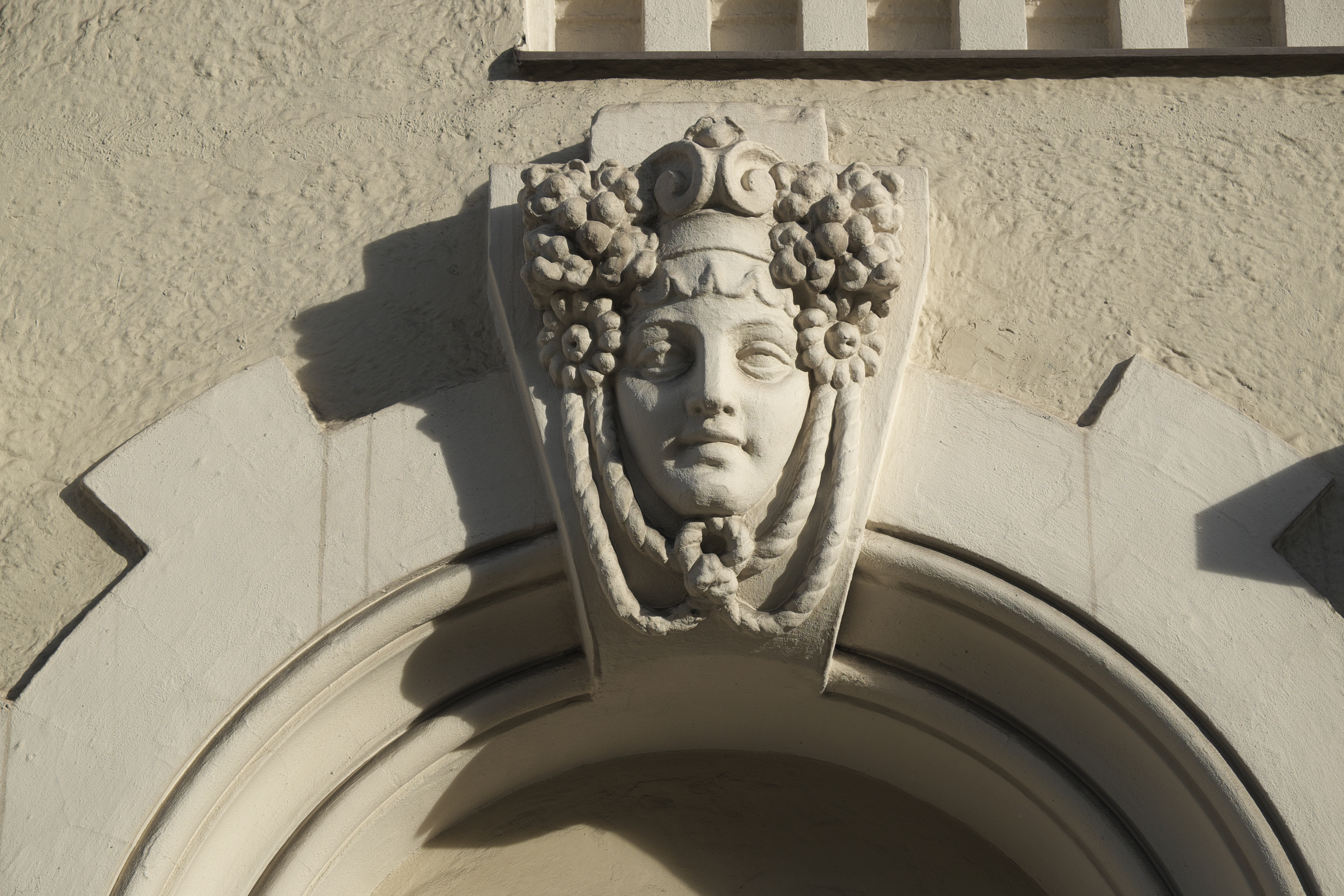 Mietshaus in der Donnersbergerstraße 50a in Neuhausen im Stadtbezirk Neuhausen-Nymphenburg in München (Bayern/Deutschland), um 1900